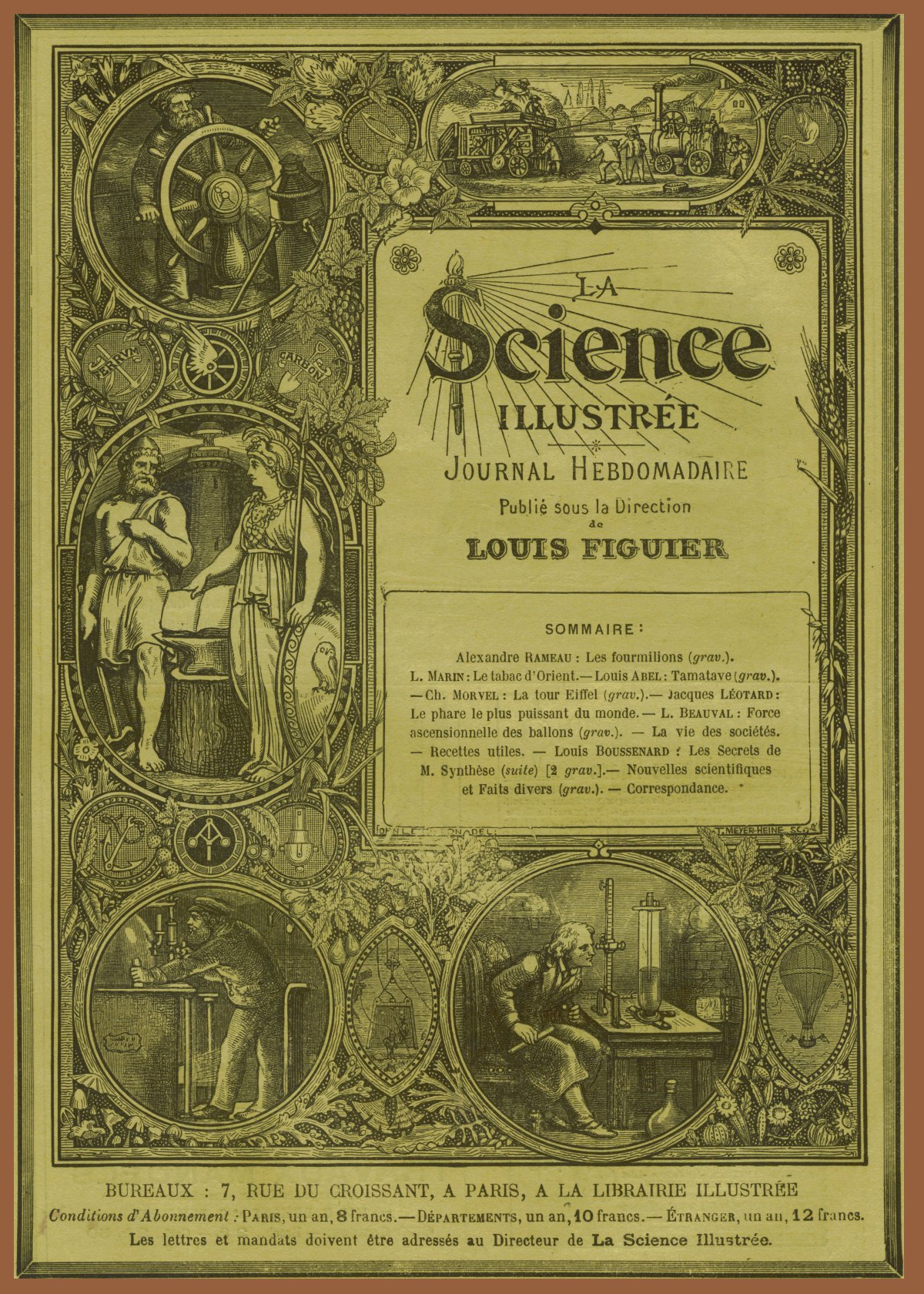 Couverture de la revue La Science illustrée